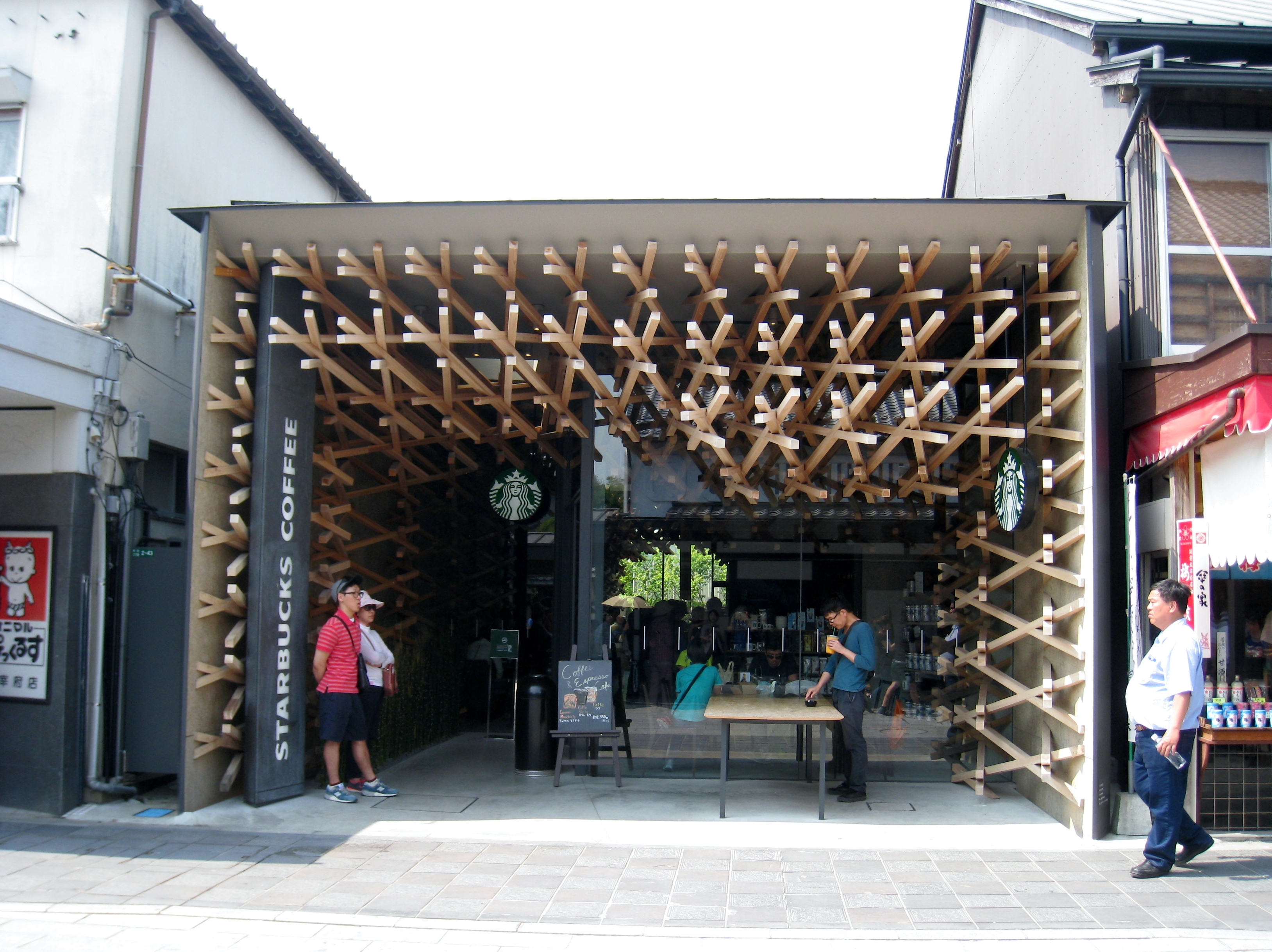 太宰府市宰府のスターバックス